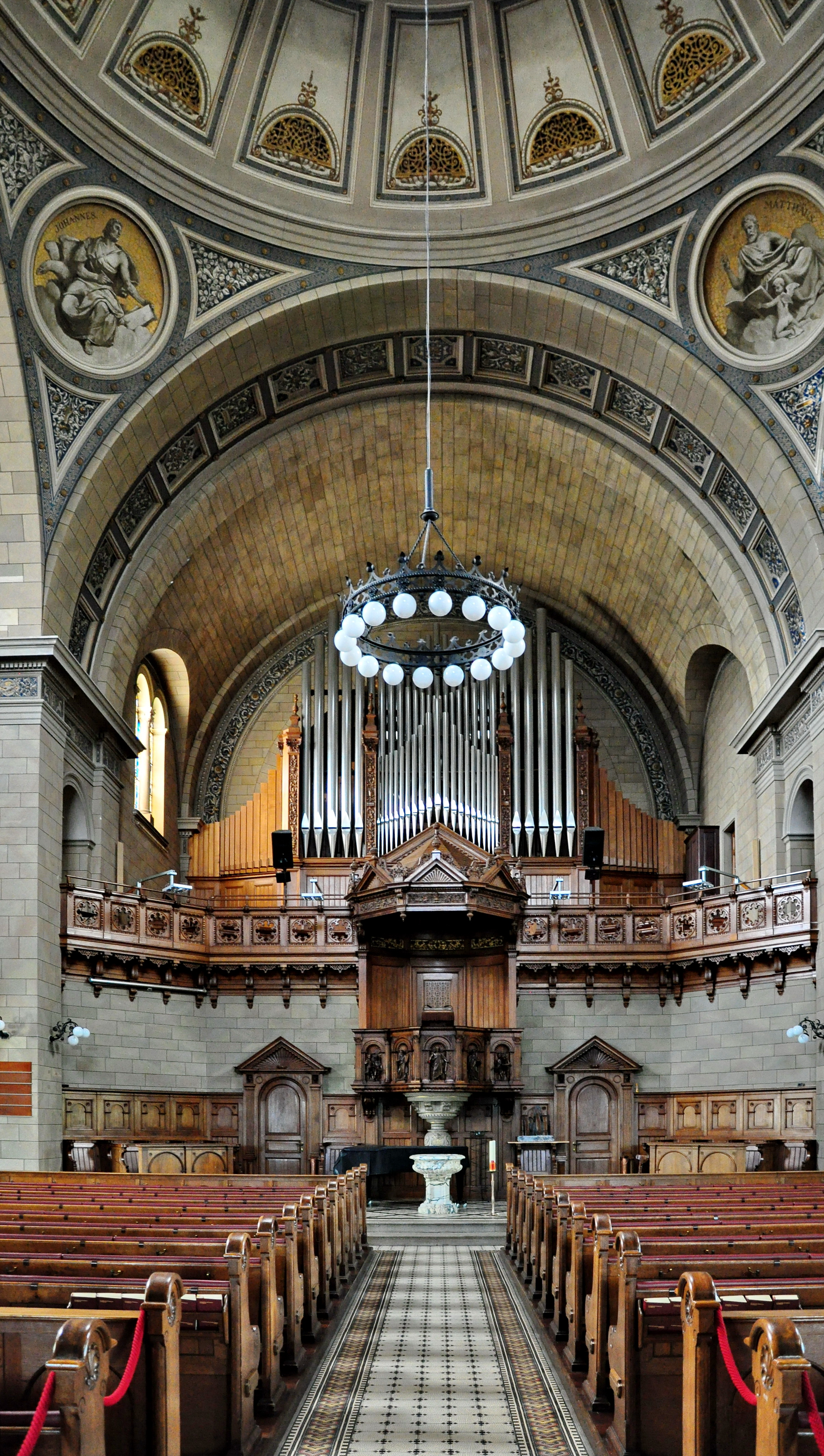 Kirche Enge in Zürich-Enge (Switzerland)